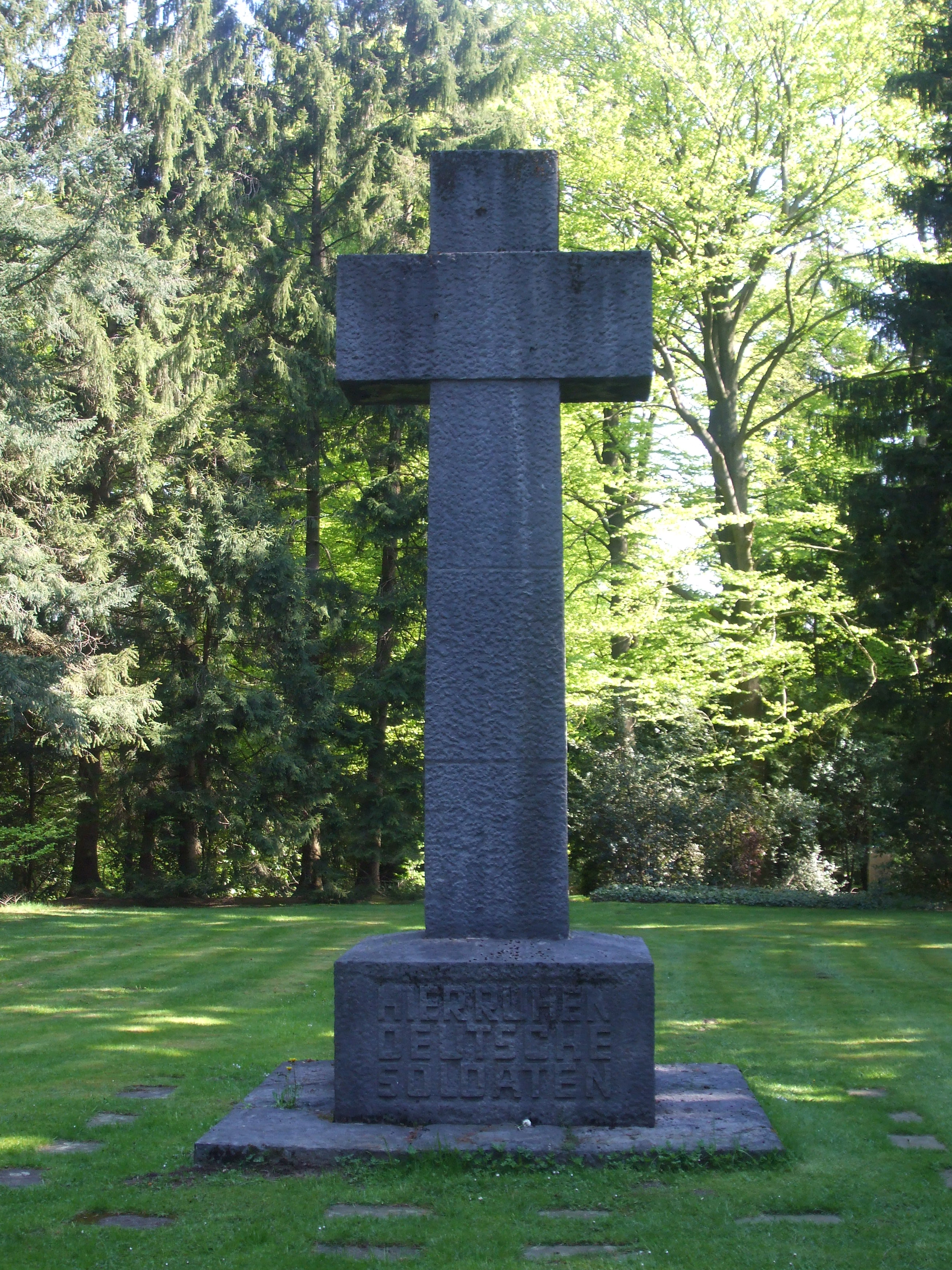 Waldfriedhof Aachen, 6,2 m hohes und 30 to schweres Hochkreuz aus belgischem Granit, das am 26.10.1957 hier aufgestellt wurde und vorher auf dem deutschen Ehrenfriedhof in Ougrée-Boncelles stand